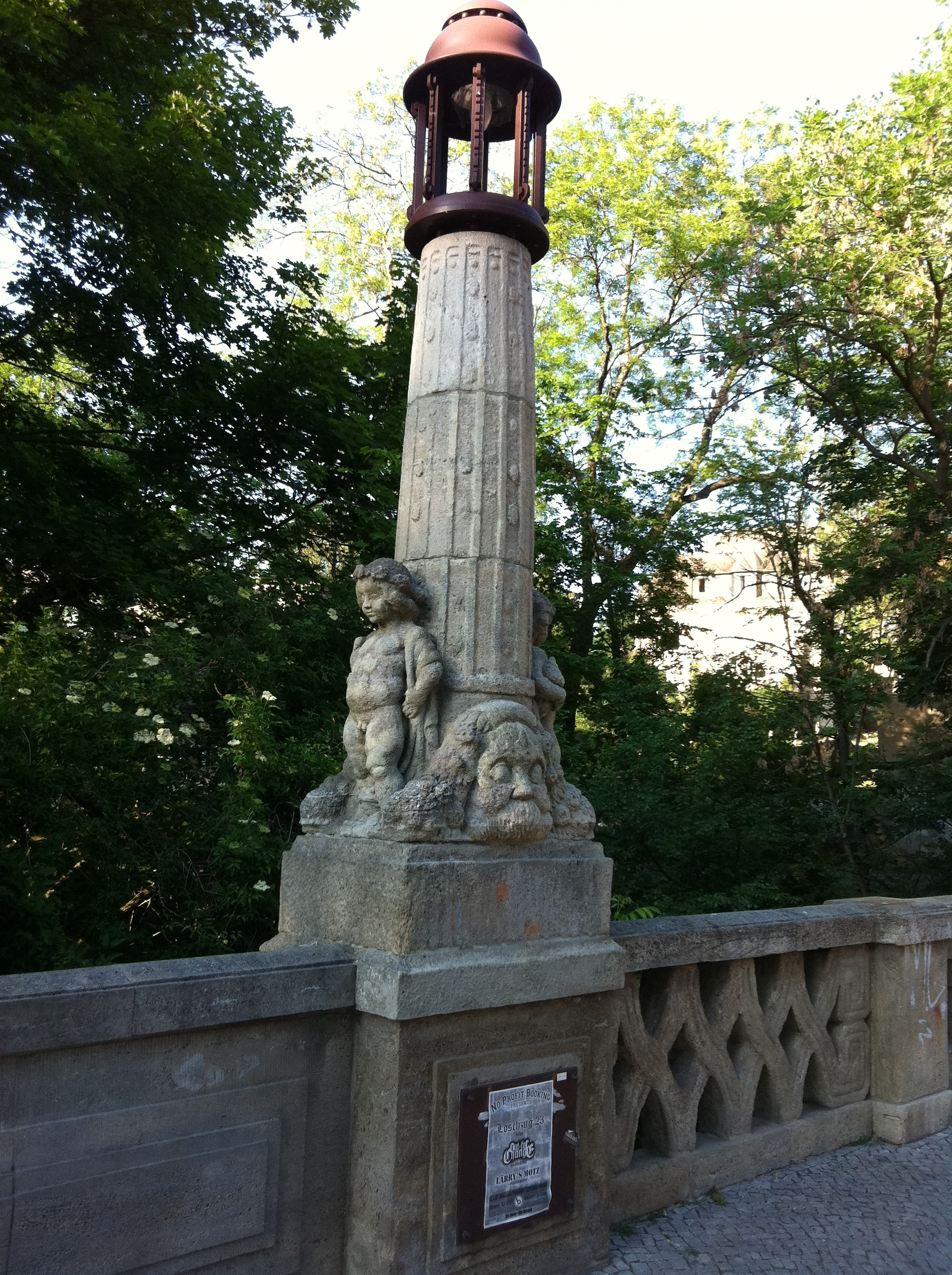 Eine von vier Kandelaberleuchten der Steinmühlenbrücke in Halle Saale